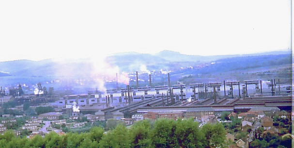 La « fenderie » devant le laminoir à chaud de la Sollac. A gauche, on distingue les hauts fourneaux.